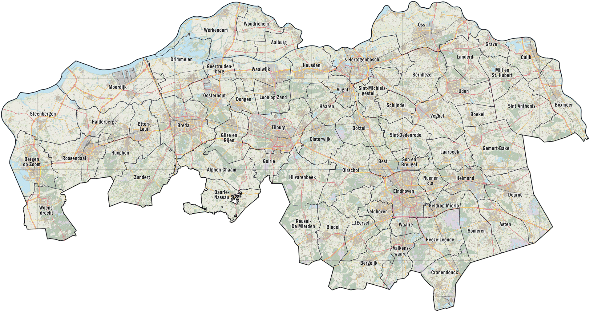 Overzichtskaart van de gemeenten in de provincie. Kaartbeeld o.b.v. Basisregistratie Topografie (BRT, Kadaster) en de OpenStreetMap (OSM). Grenzen o.b.v. het TopGrenzen bestand van Kadaster.